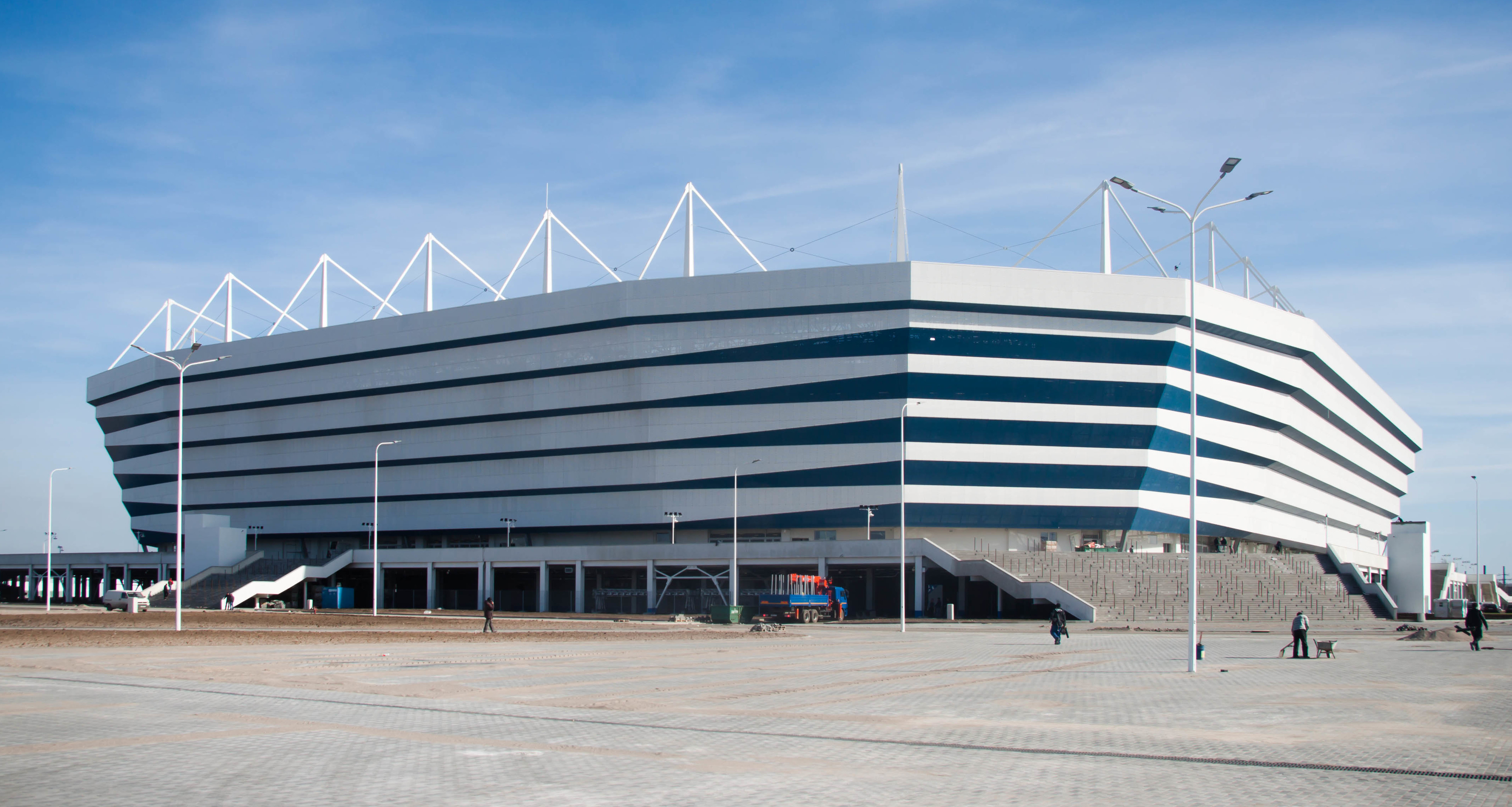 Стадион Калининград 7 апреля 2018 года